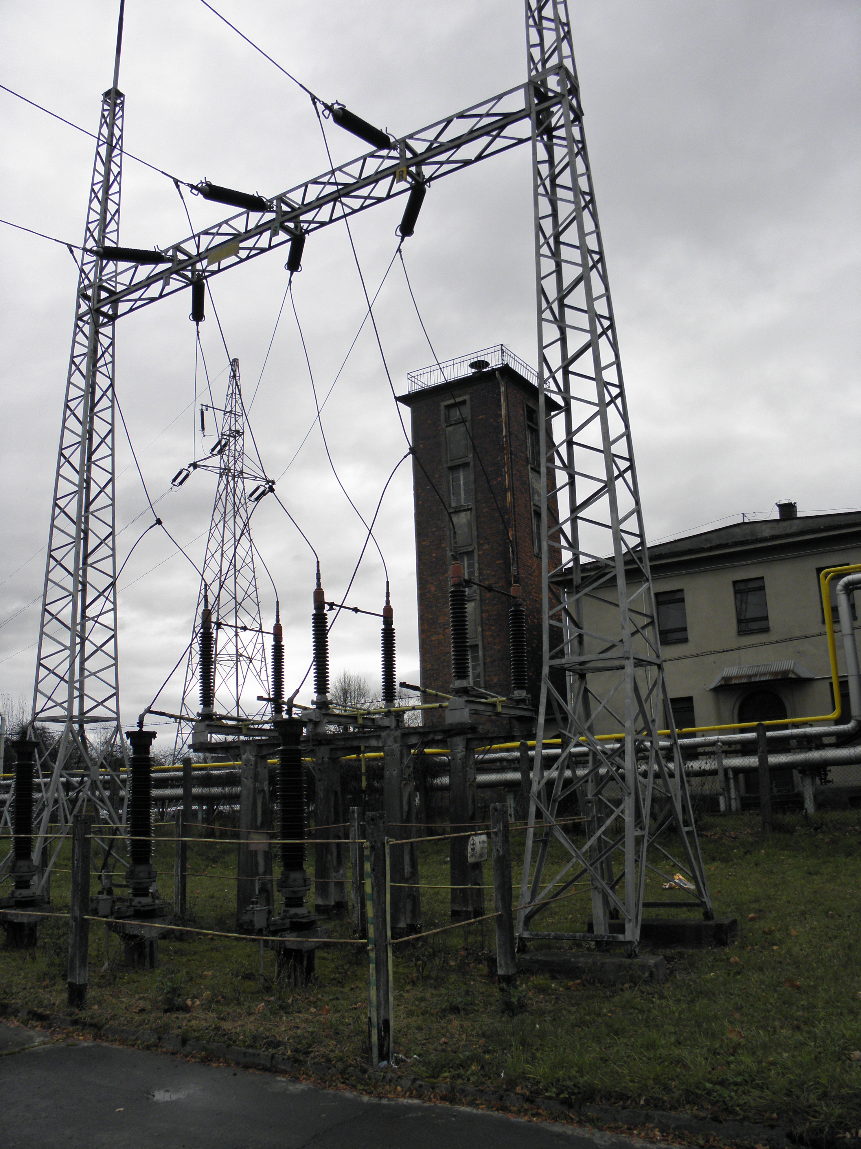 Bramka linowa 110kV na jednym z pracujących obiektów